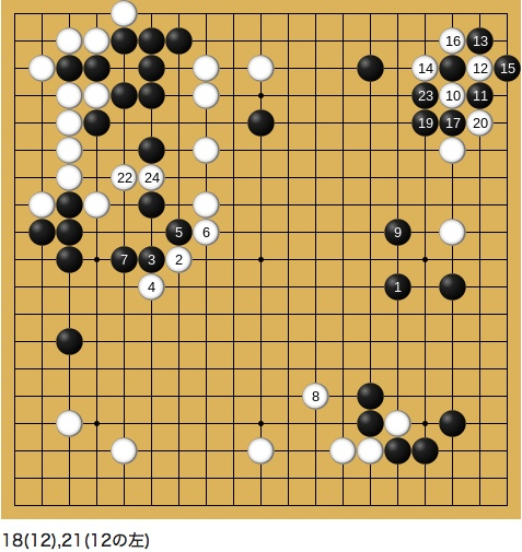 180手白中押勝